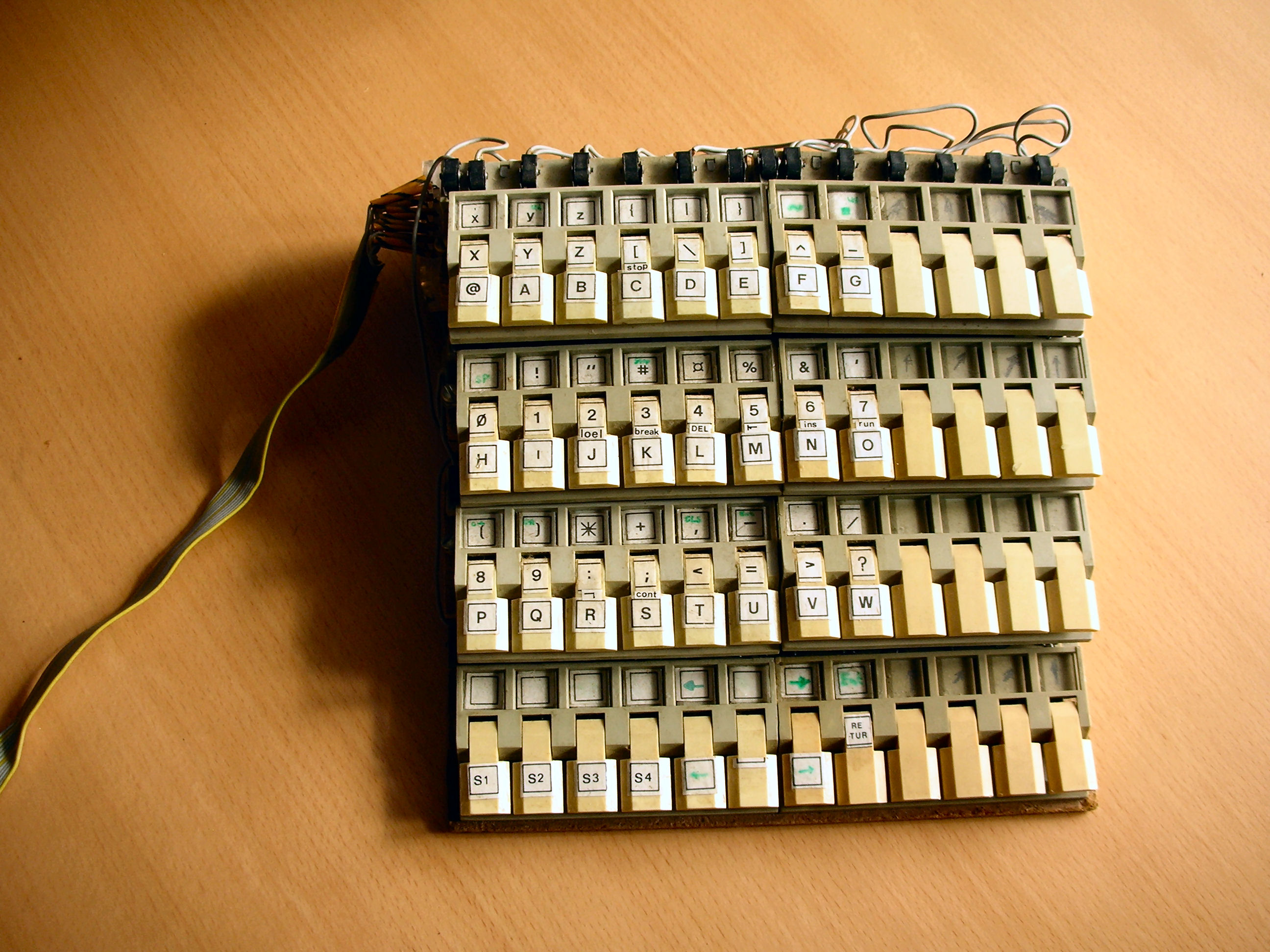 Eigenbautastatur für Mikrorechnerbausatz Z1013, 1986